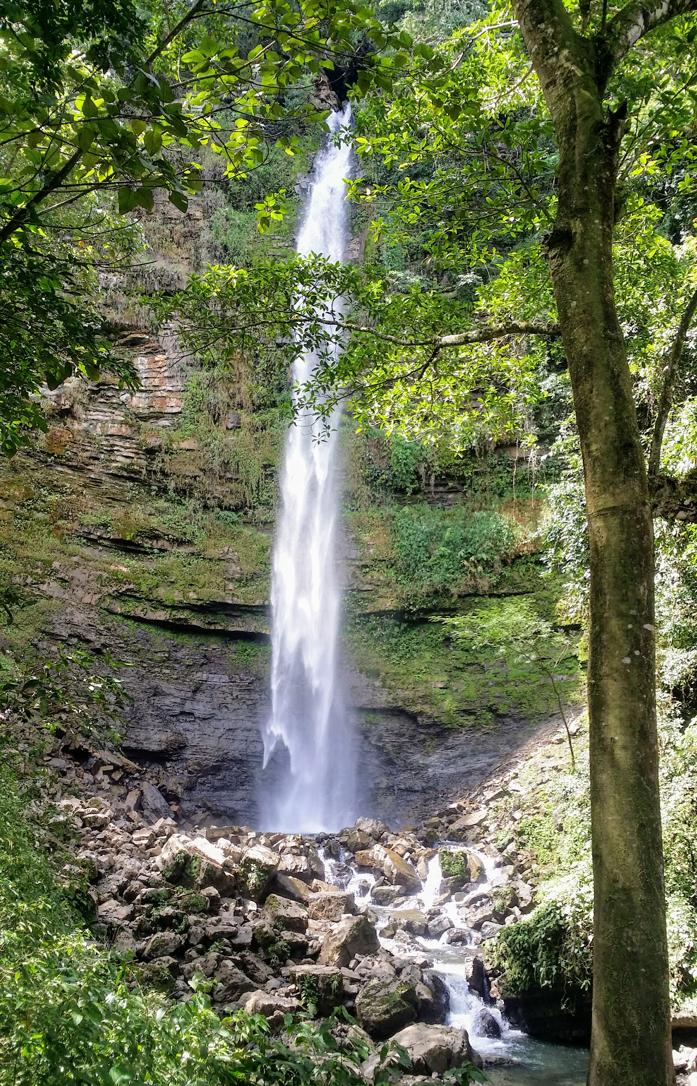 Chorro San Miguel visto